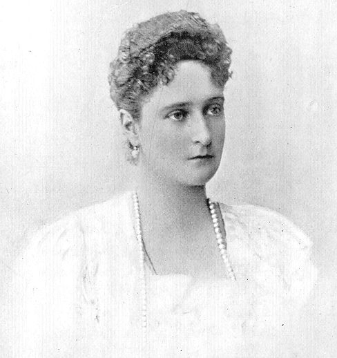 Aleksandra Fiodorovna RomanovaPhotograph of the Czarina Alexandra of Russia, June 1901.